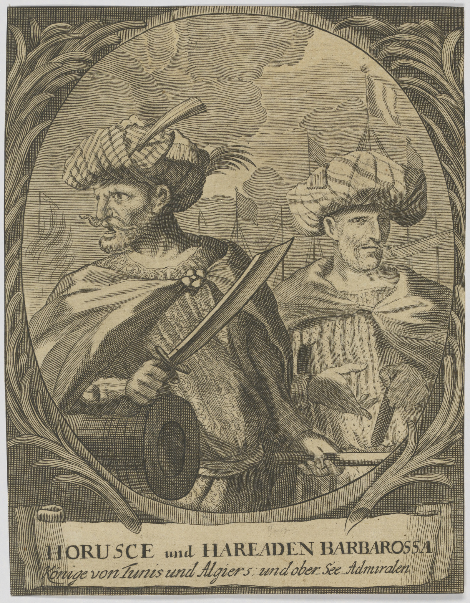 صورة للأخوين عروج وخير الدين بربروس وجدت في مكتبة جامعة لايبزيغ.